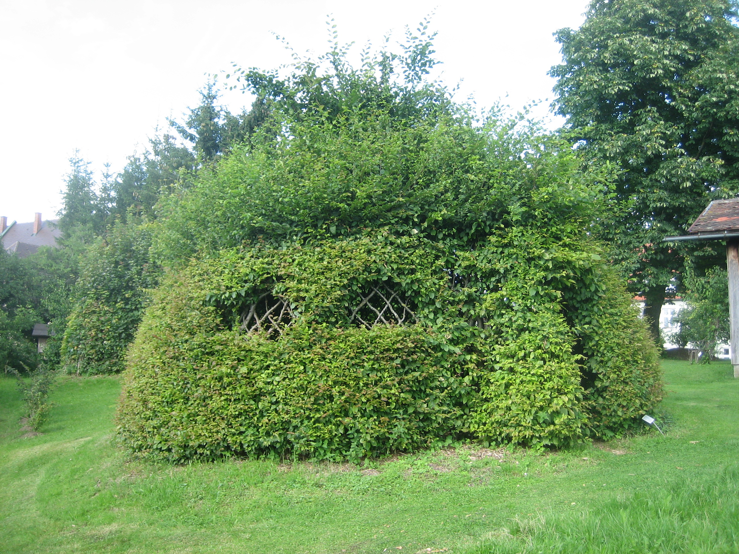 Kreislehrgarten in Bad Grönenbach